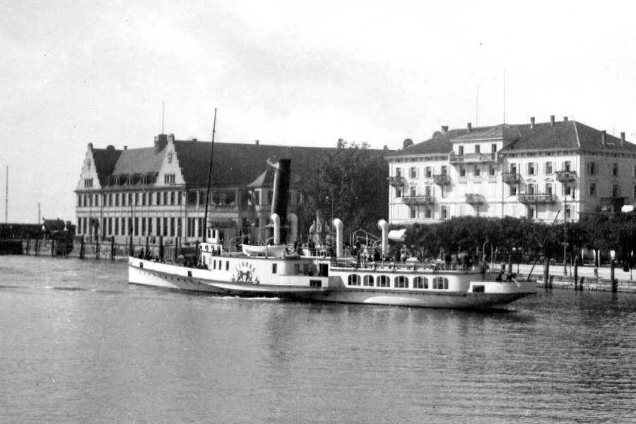 Die Lindau (Schiff, 1905) legt 1906 im Hafen von Lindau (Bodensee) rückwärts an einem Liegeplatz an der Ostmole an.